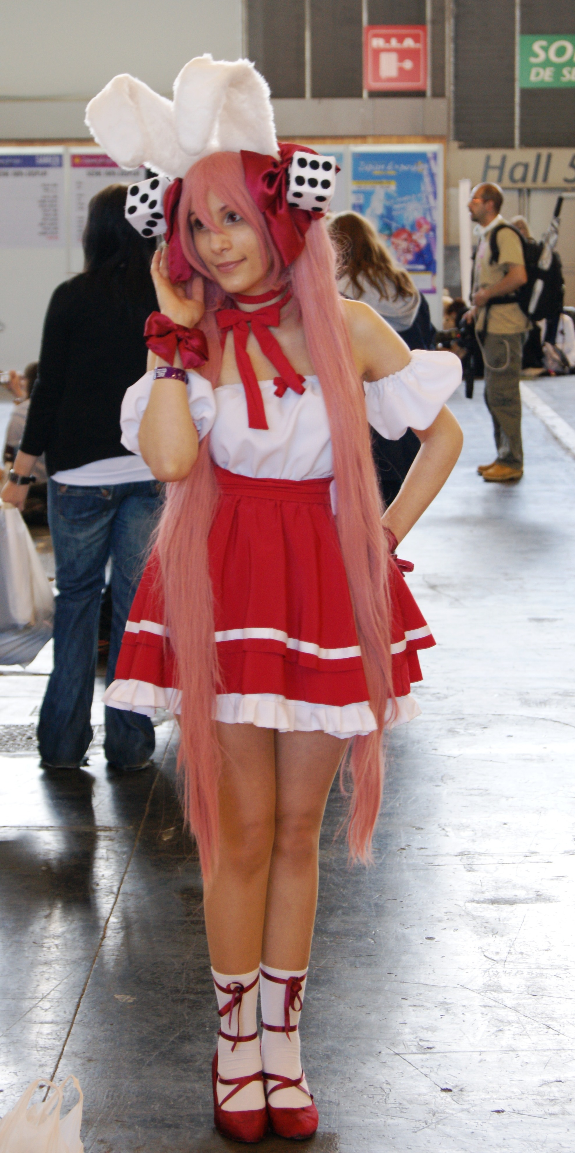 Cosplay d'Ecaflip tiré du jeu vidéo Dofus - Japan Expo 2012